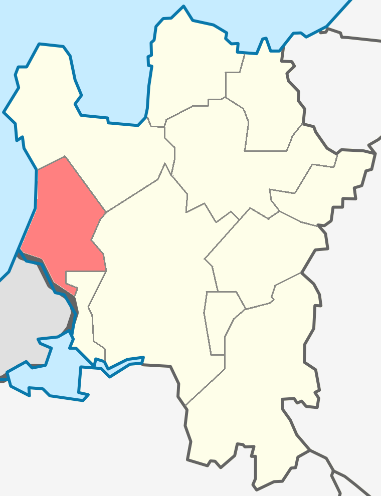 Кузёмкинское сельское поселение на карте Кингисеппского района